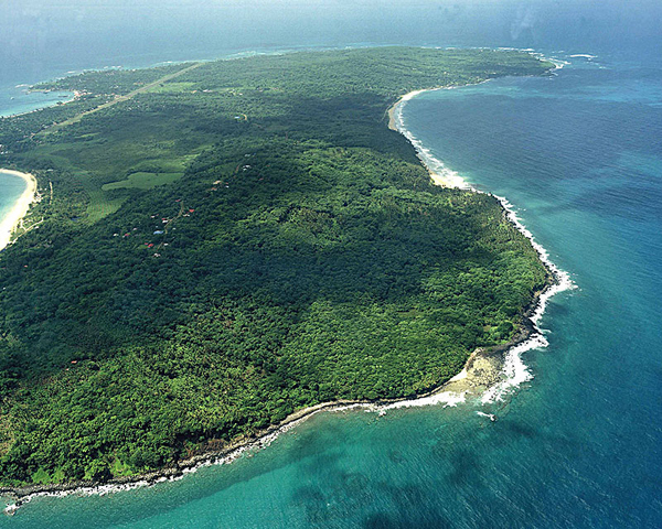 Luftaufnahme der Corn Islands